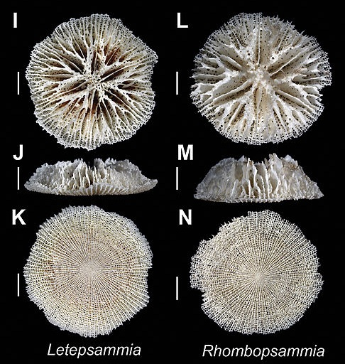 Recorte de ZooKeys-227-001-g019 jpeg de Commons